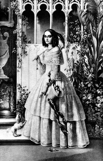 Екатерина Александровна Сухозанет, ур. Белосельская-Белозерская (1804—1861)